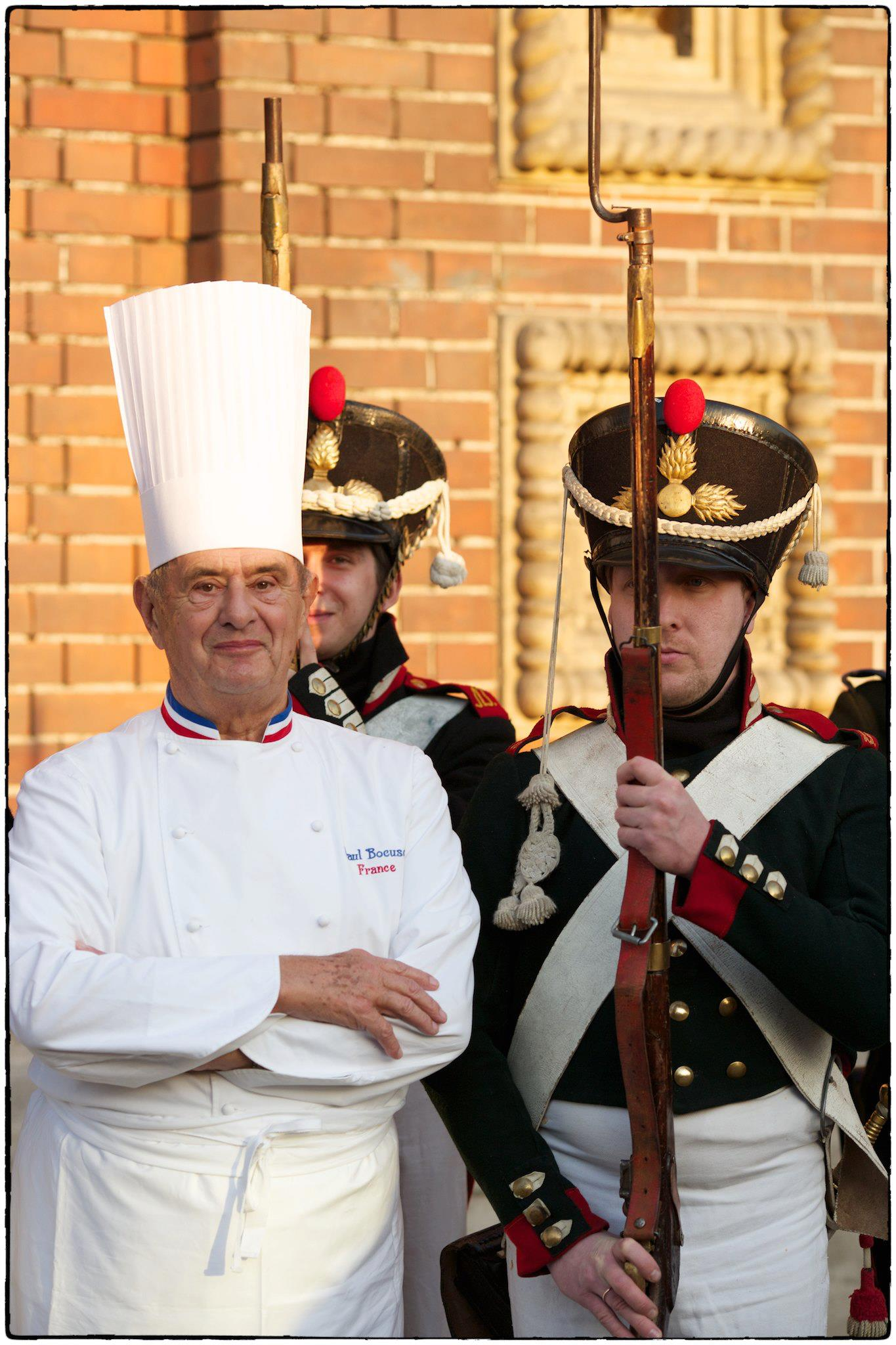 Поль Бокуз в Москве, около французского посольства